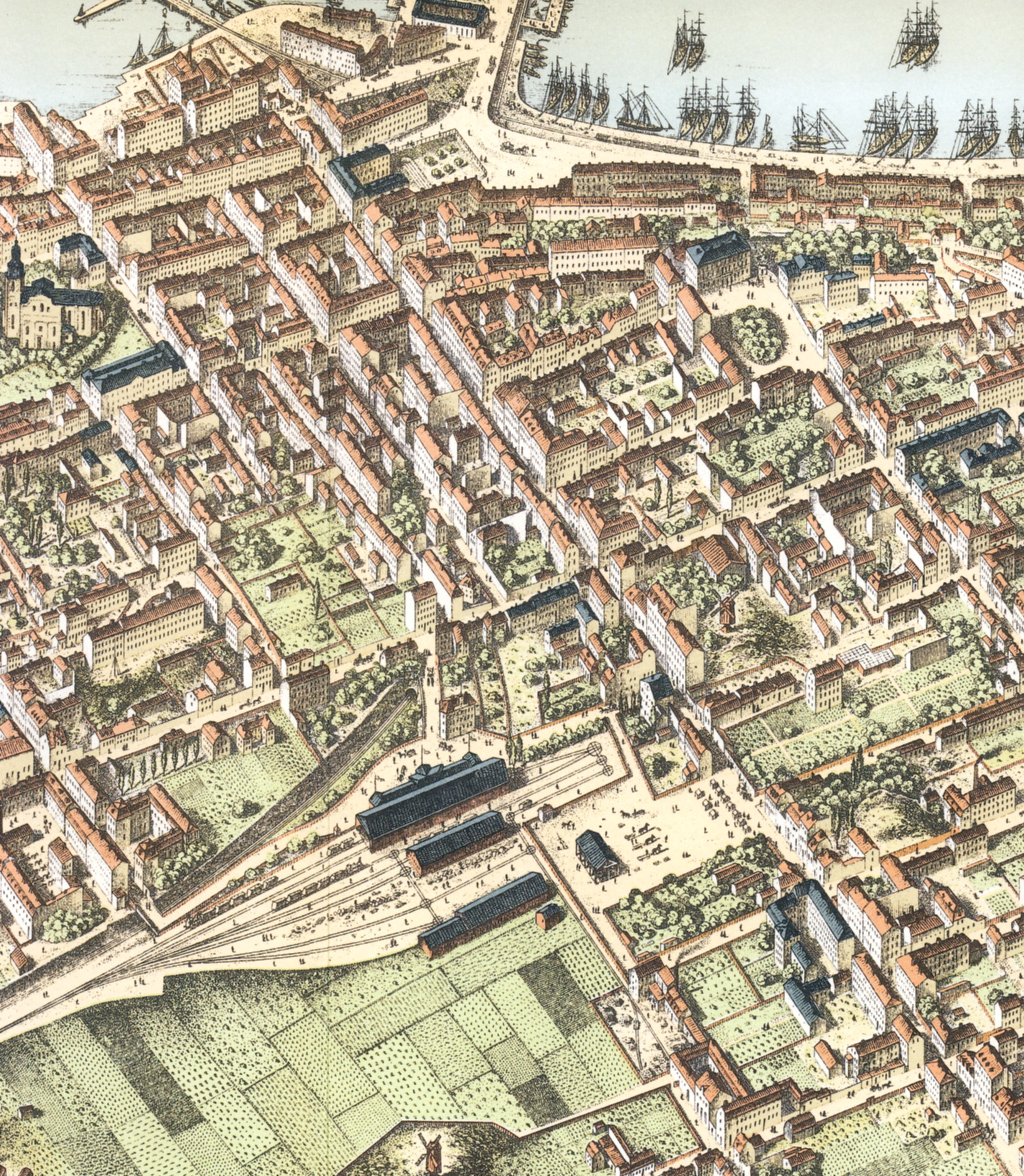 Del av Neuhaus panoramakarta över Stockholm, del av norra Södermalm